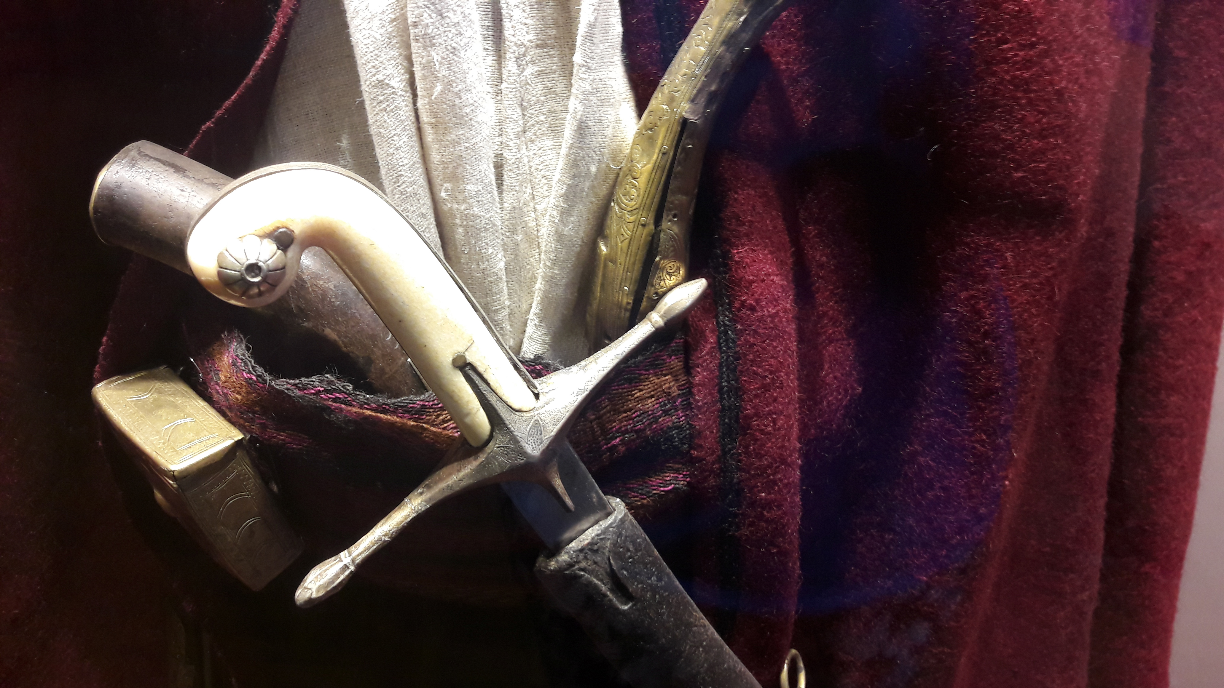 Tkanice muške narodne nošnje u kojima su zadenute:sablja tipa "kl'č" sa sečivom tipa "šamšir" (XVIII-XIX vek), pištolj "kremenjač" (XVIII-XIX vek) i pištoljem tipa "kapislar" (XIX vek). Izloženi su u okviru NArodnog muzeja Kruševac.